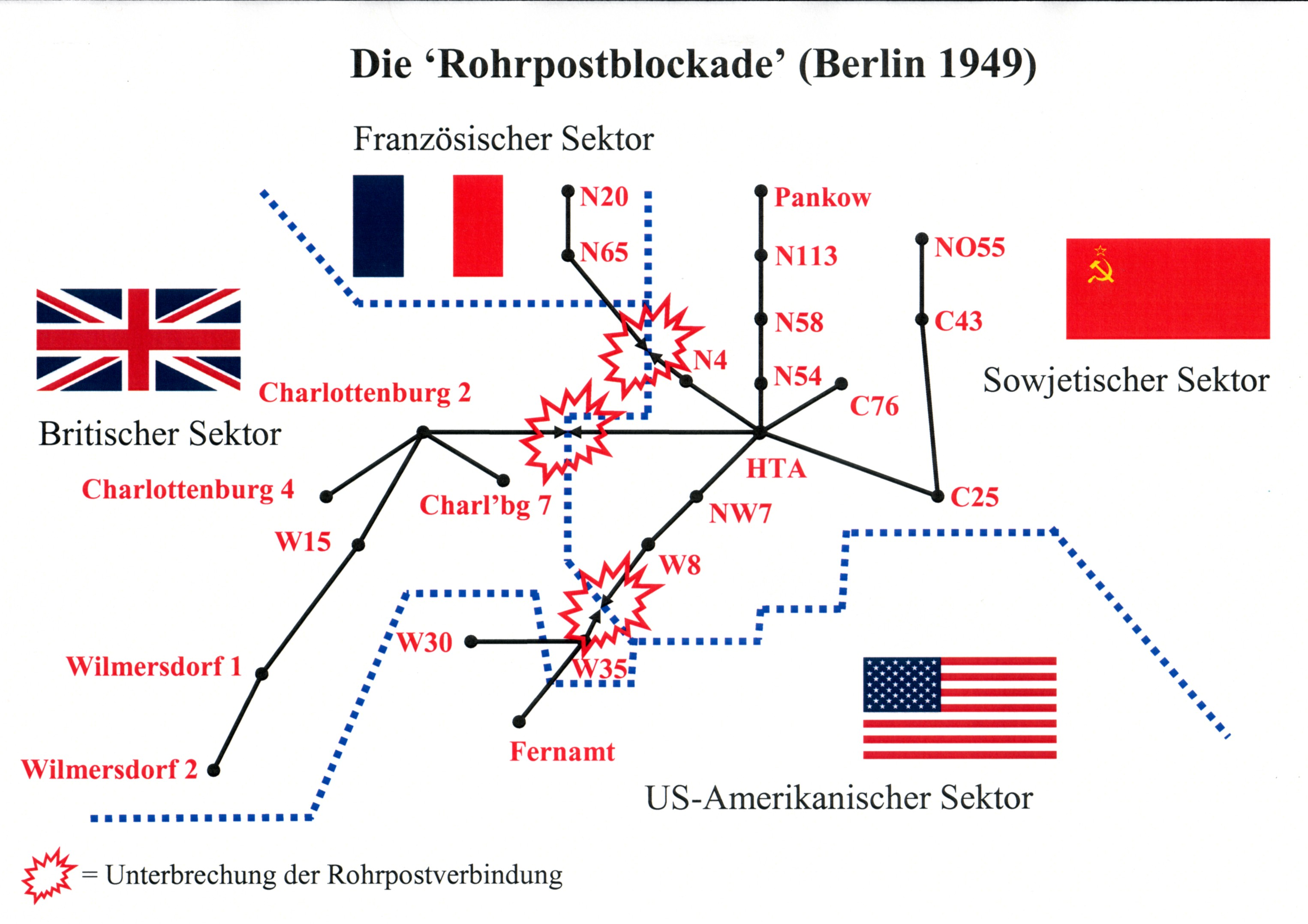 Skizze zur Rohrpostblockade in Berlin 1949